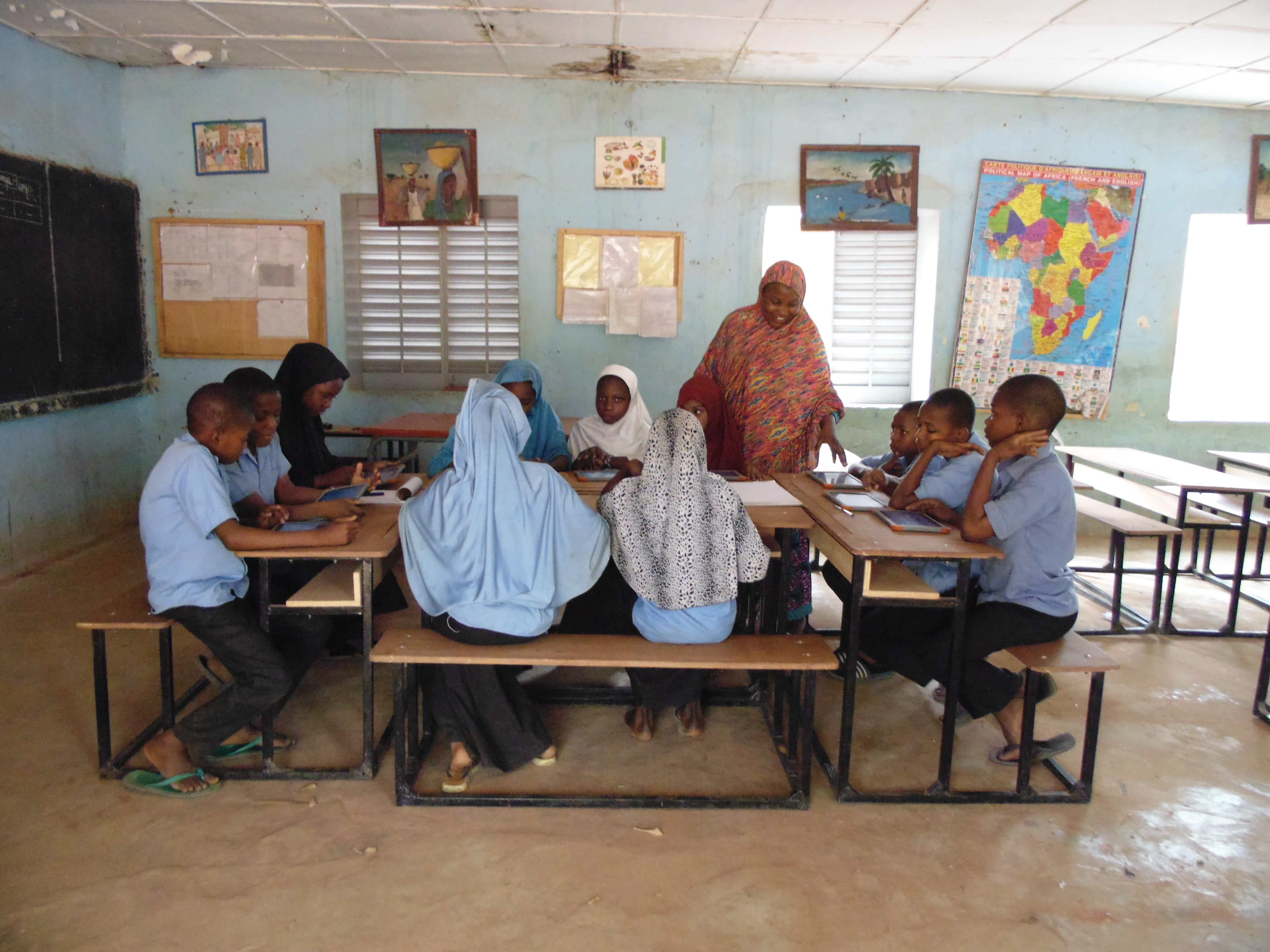 wikichallenge 2019